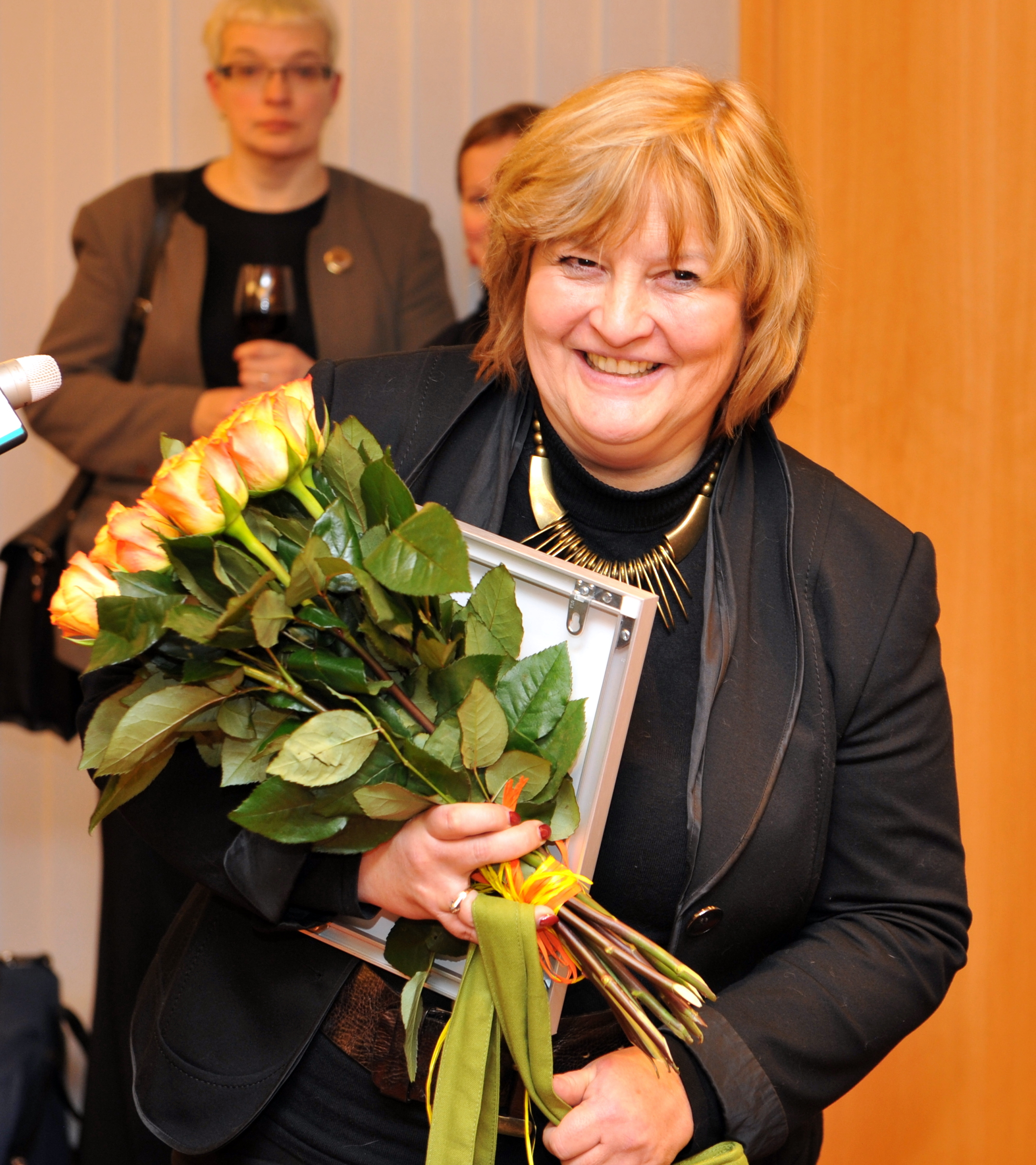 Tiina Lokk